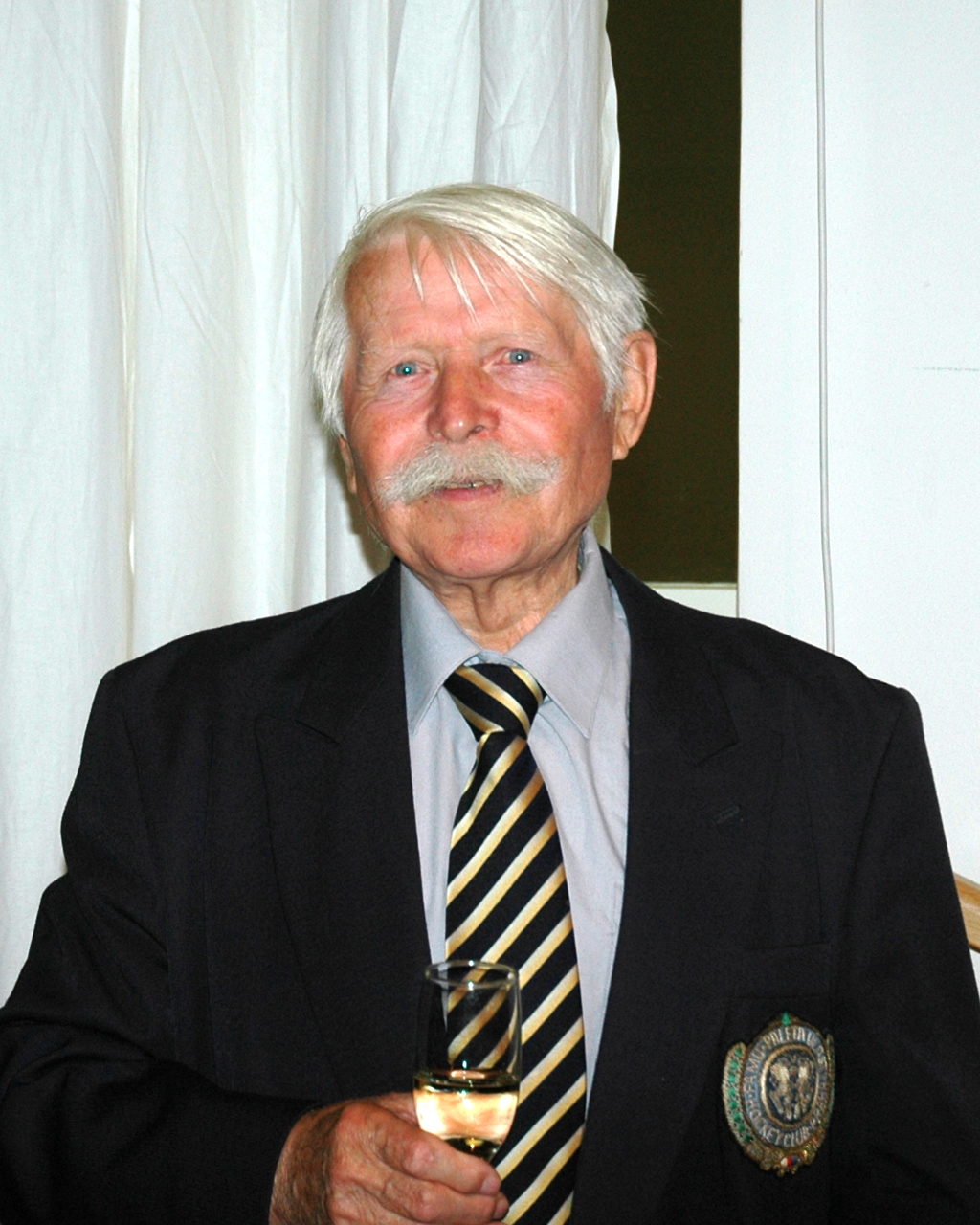 Josef Klimeš (2012)